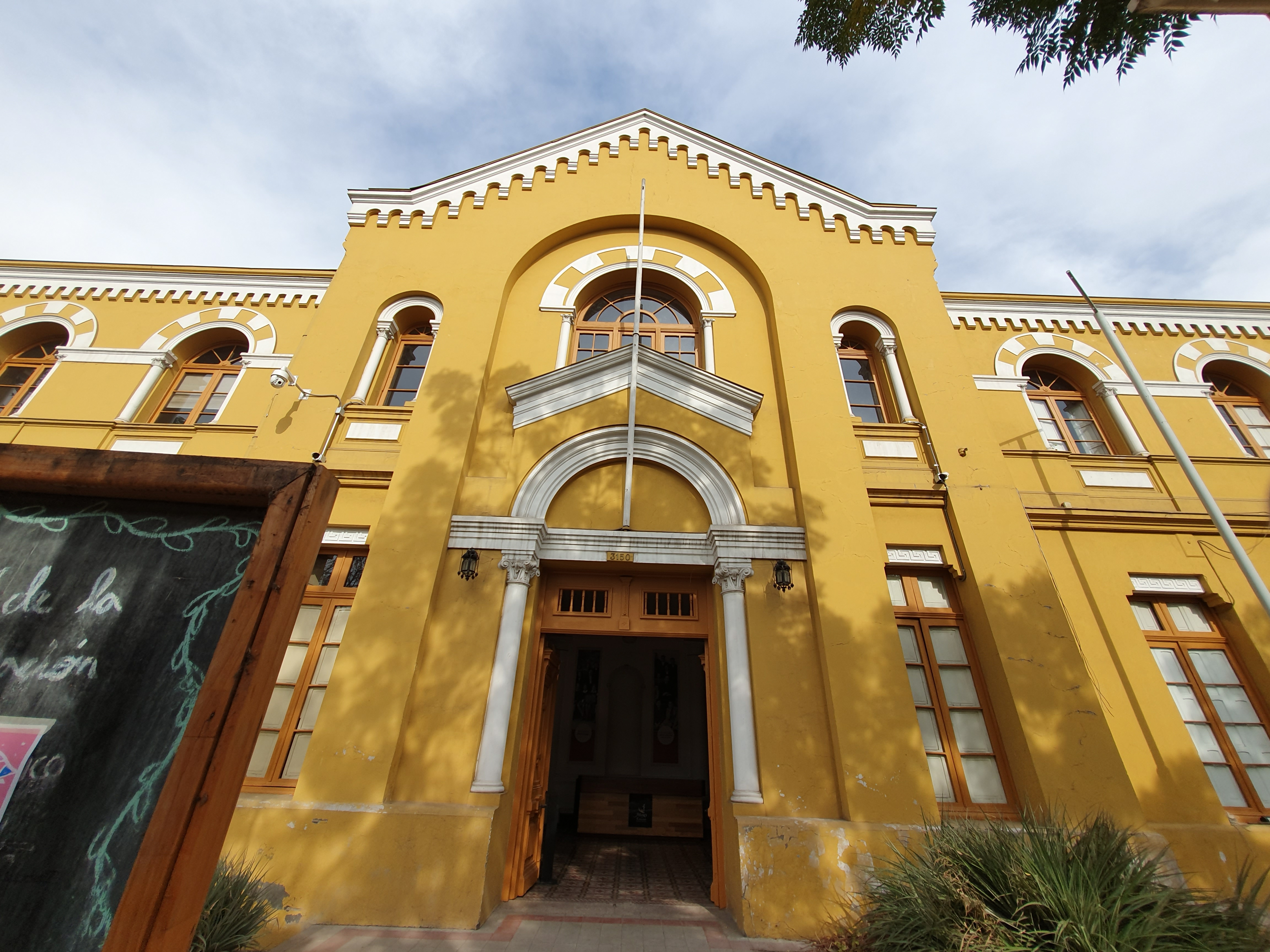 Frontis del Museo de la Educación Gabriela Mistral, en Santiago de Chile.